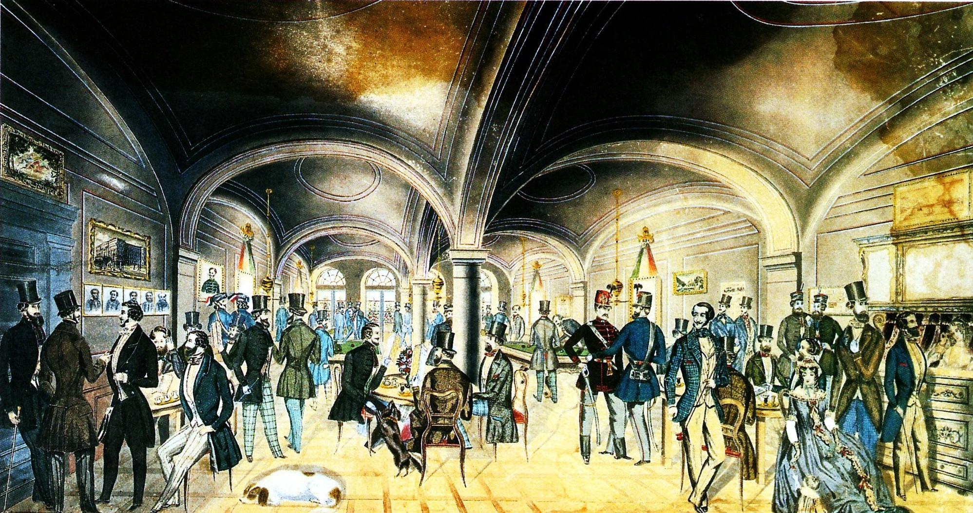 Az 1848-as forradalmi események egyik színhelye, a pesti Pilvax kávéház. Preiszler József színezett tollrajza